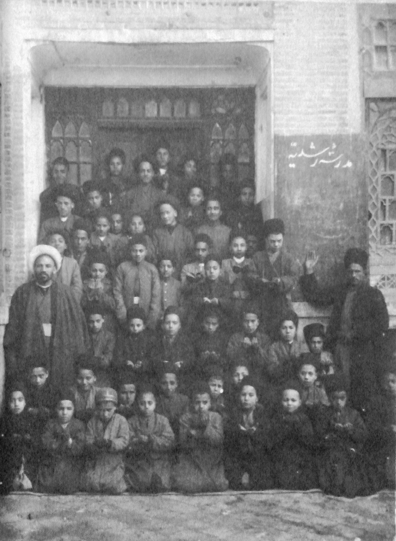 مدرسه رشدیه تبریز